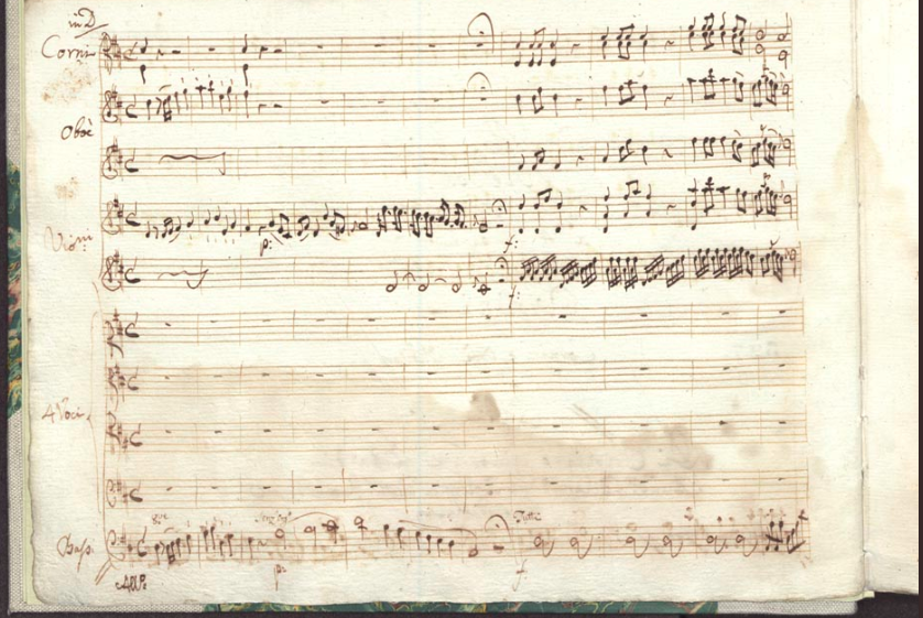 Prima pagina del manoscritto, probabilmente autografo, di una «Messa a quattro voci» di Christian Joseph Lidarti, conservata nel Conservatorio di Firenze